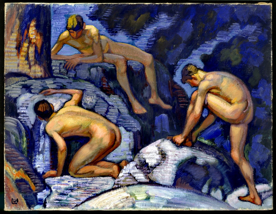 Ludwig von Hofmann: Die Quelle, Öl auf Leinwand, Thomas-Mann-Archiv der ETH Zürich